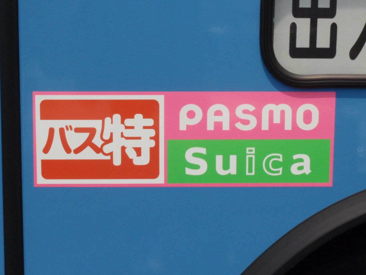 「バス共通カード」の文字が消え、代わりに「バス特」の文字が入れられたステッカー